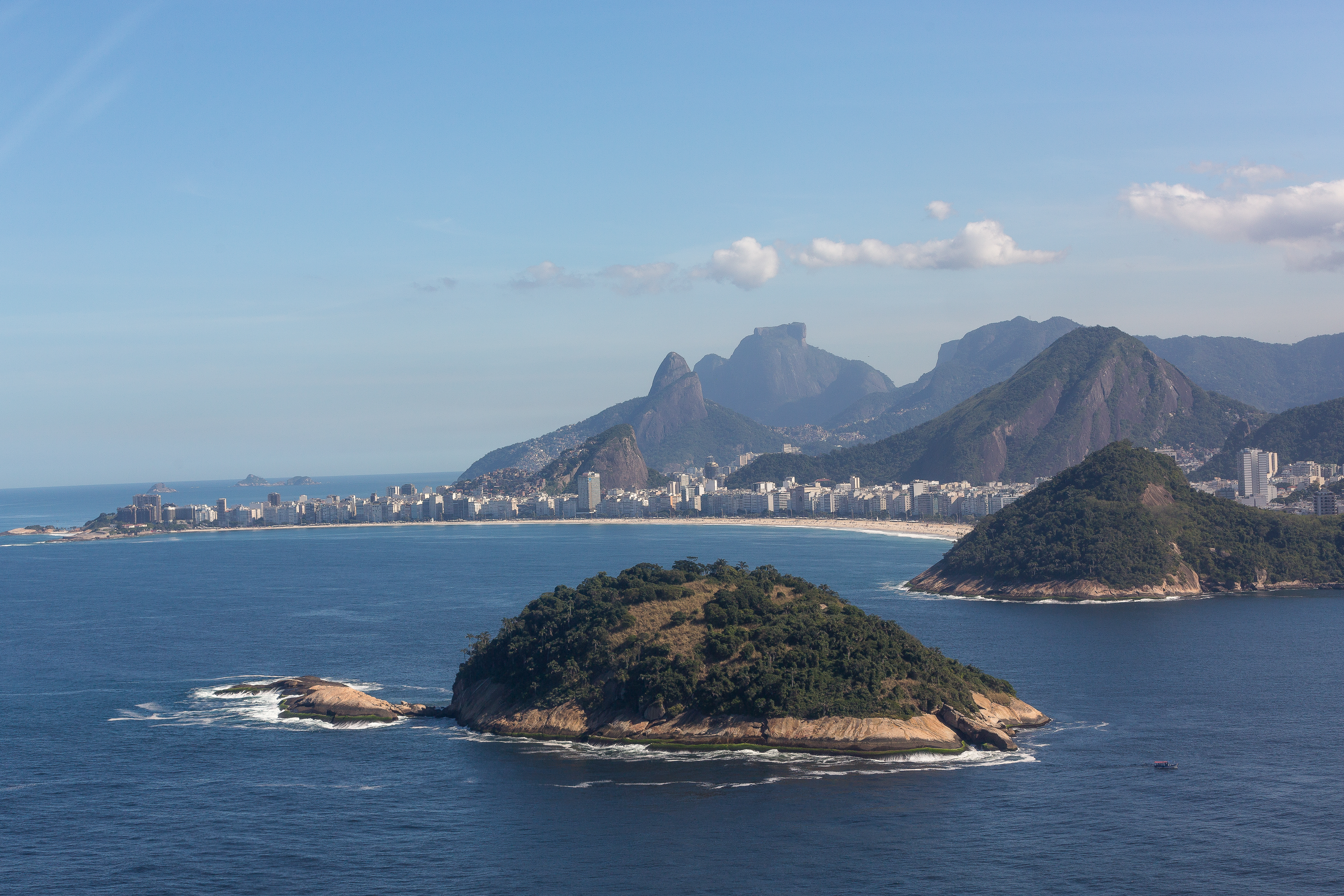 Vista aérea da Ilha de Cotunduba, Rio de Janeiro - RJ - Brasil.